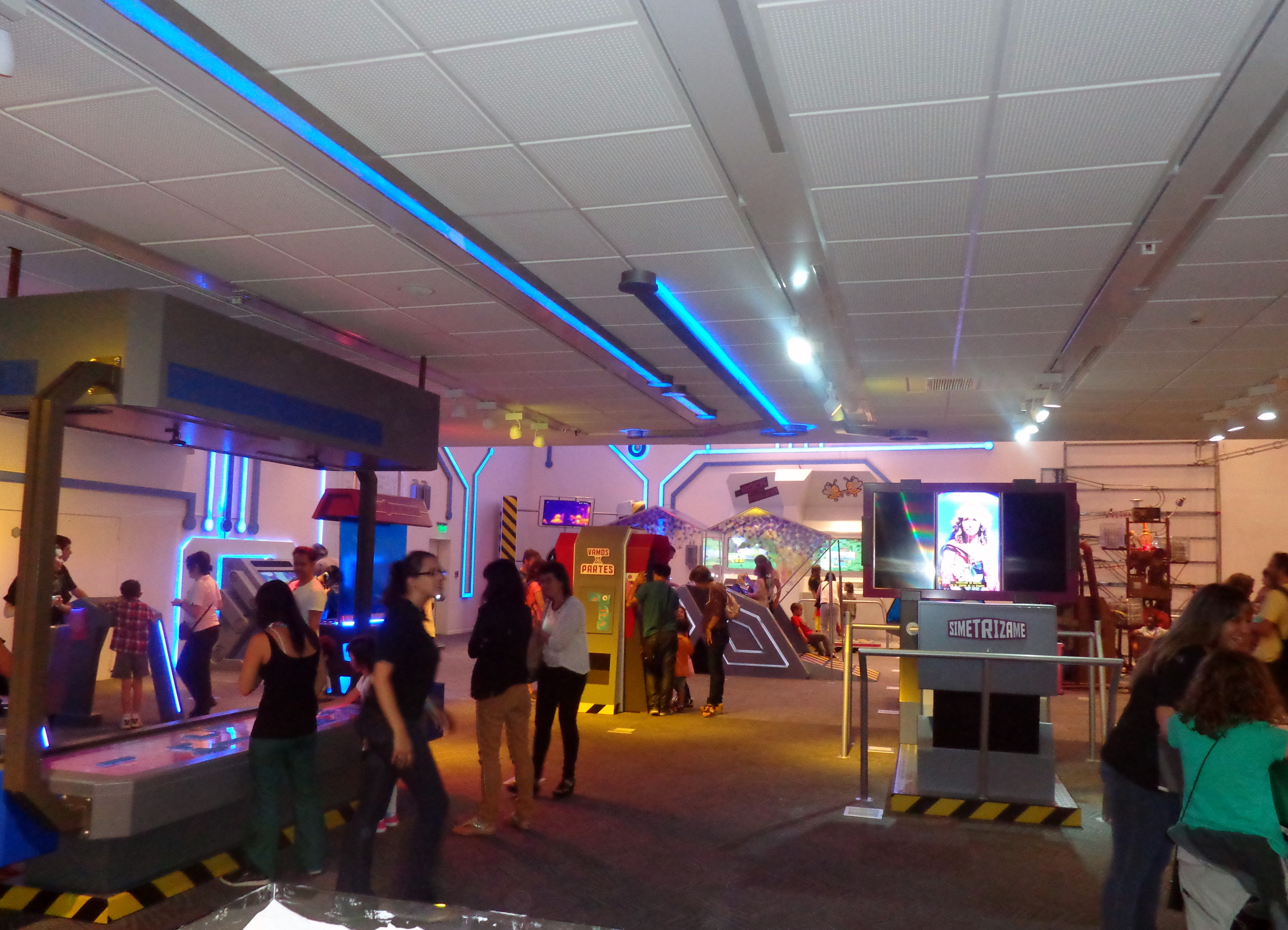 Centro Cultural de la Ciencia (C3), en el Polo Científico y Tecnológico, Buenos Aires, Argentina.